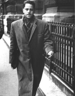 C'est la photo du Professeur Mohamed Taïeb El Kassab, éminent orthopédiste tunisien, lors de ses études en France.